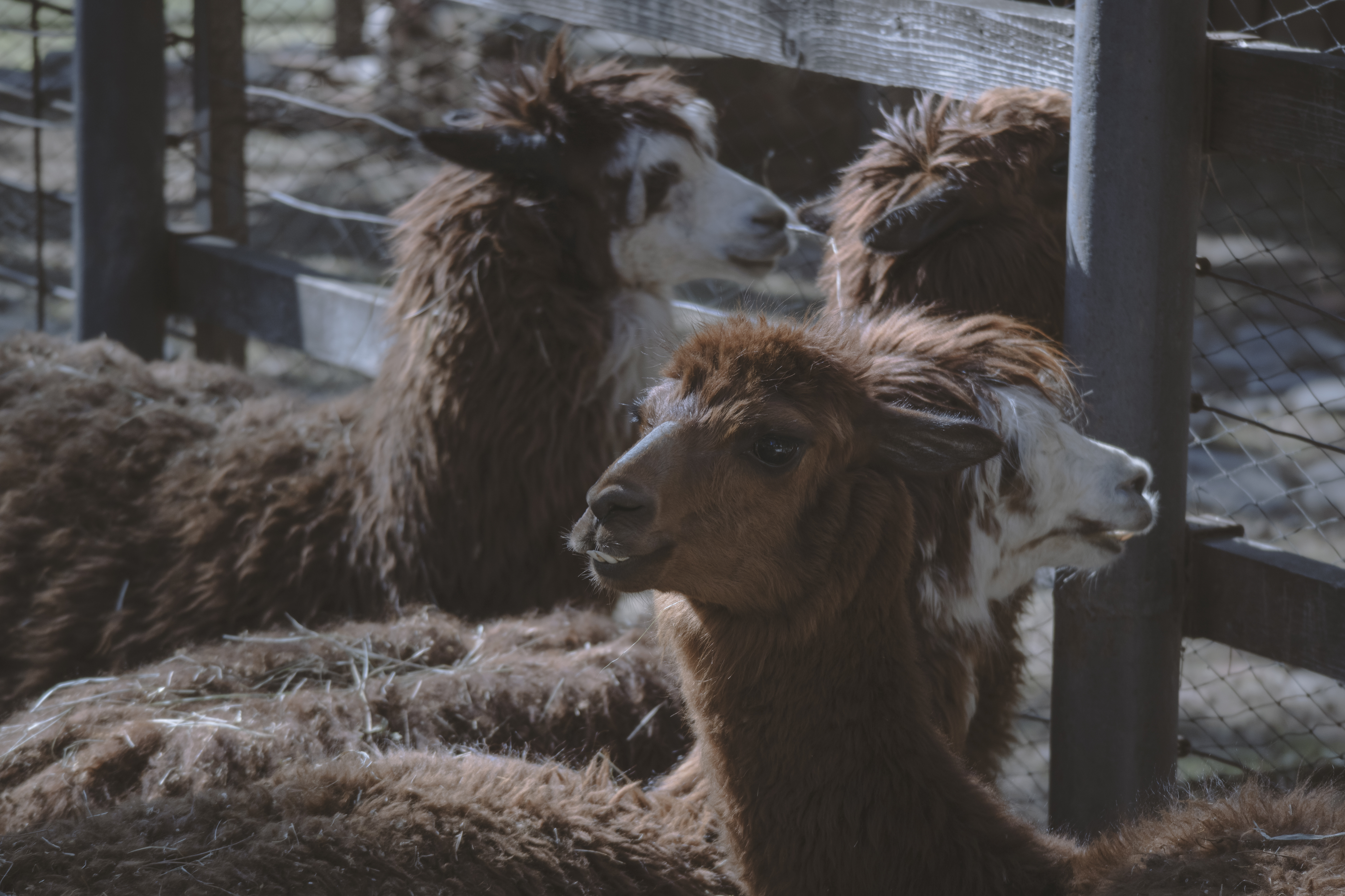 الحيوانات وتسمى أيضًا باسم "المَتْزَوِيّات" أي الحيوانات عديدة الخلايا. هي كائنات حقيقيات النوى ومتعددة الخلايا تشكل المملكة البيولوجية الحيوانية.